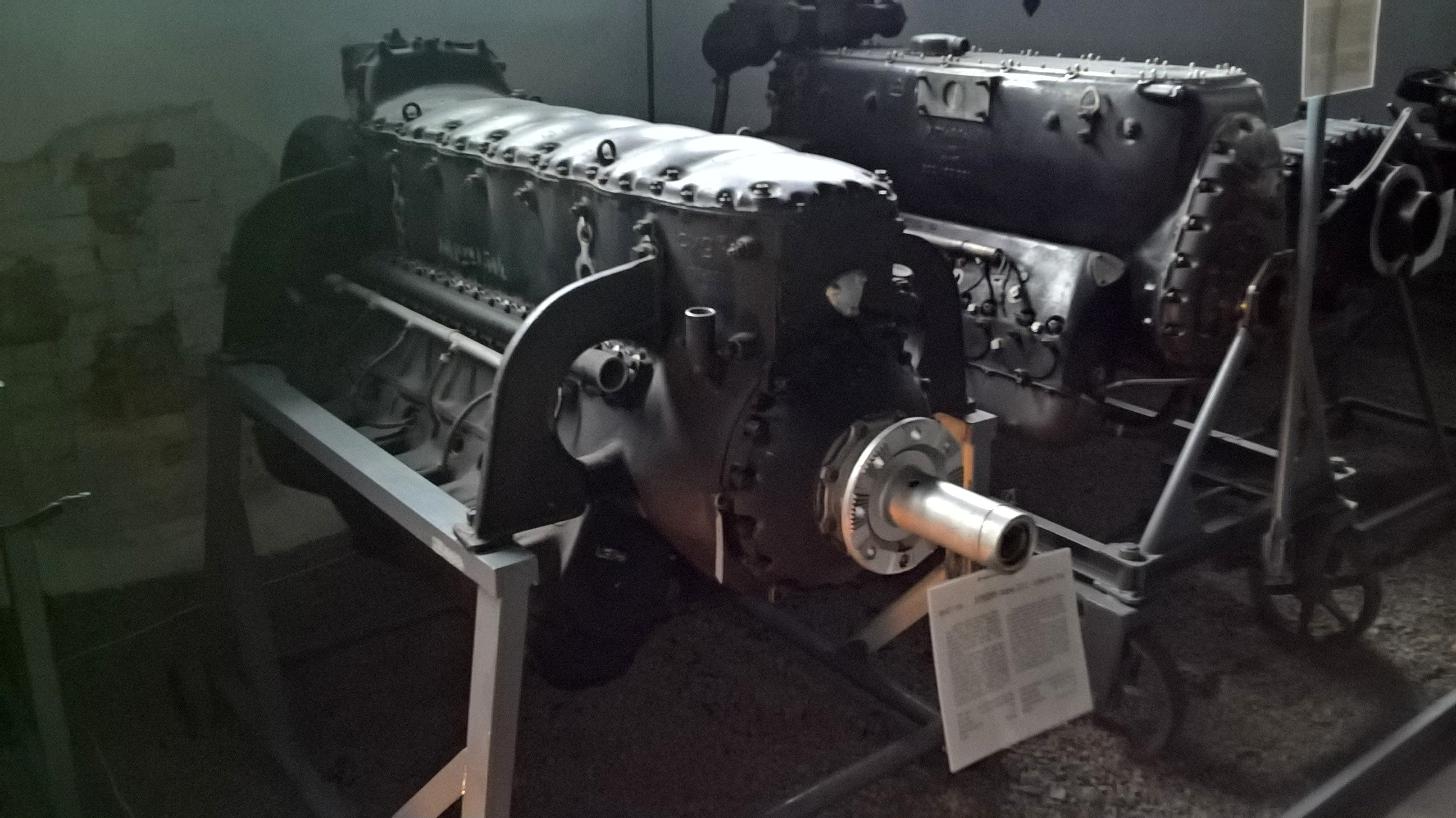 Niemiecki 12-cylindrowy silnik widlasty Junkers Jumo 211 z 1936 r. ze zbiorów Muzeum Lotnictwa Polskiego w Krakowie.